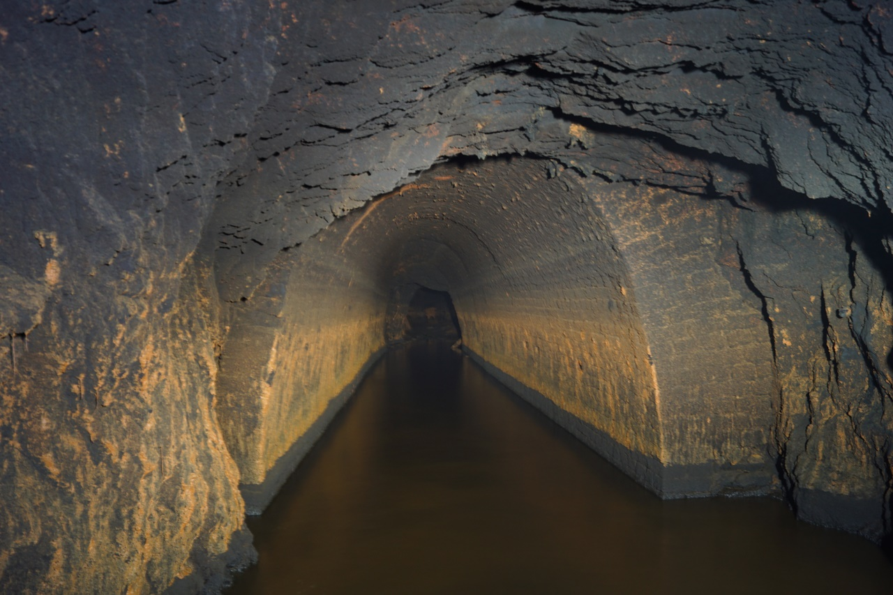 Umfahrungsstrecke